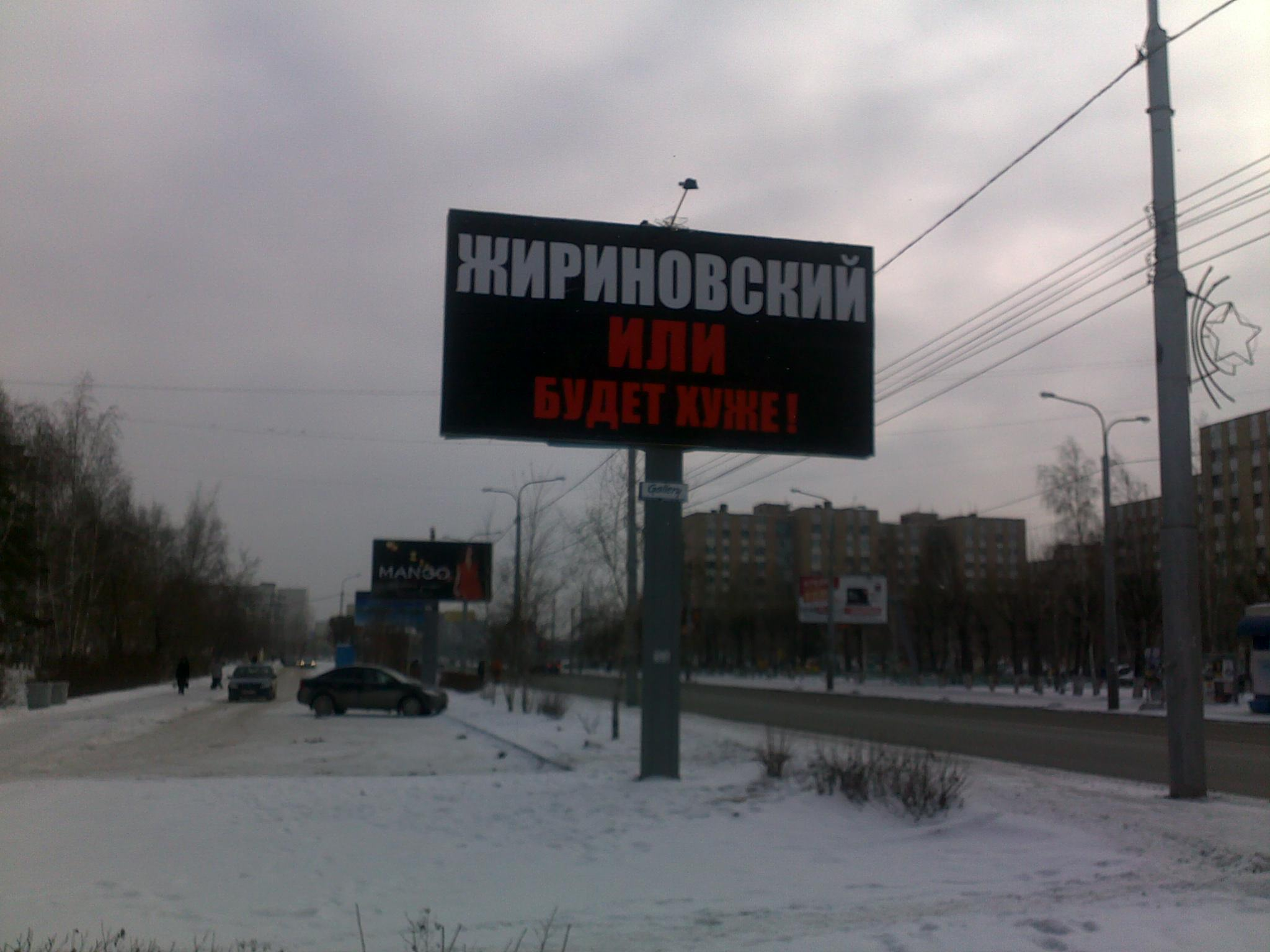 Reklama ŝildo de Vladimir Ĵirinovskij dum la prezidenta balotado. Tjumeno, Rusio.